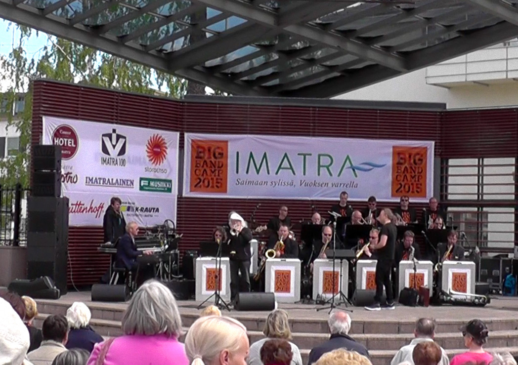 Hannu Sopanen Imatralla 26.6.2015 Imatra Big Bandin solistina.